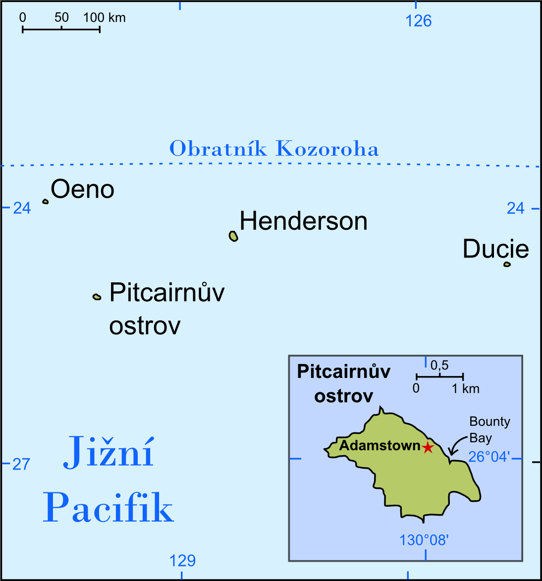 Pitcairnovovy ostrovy.